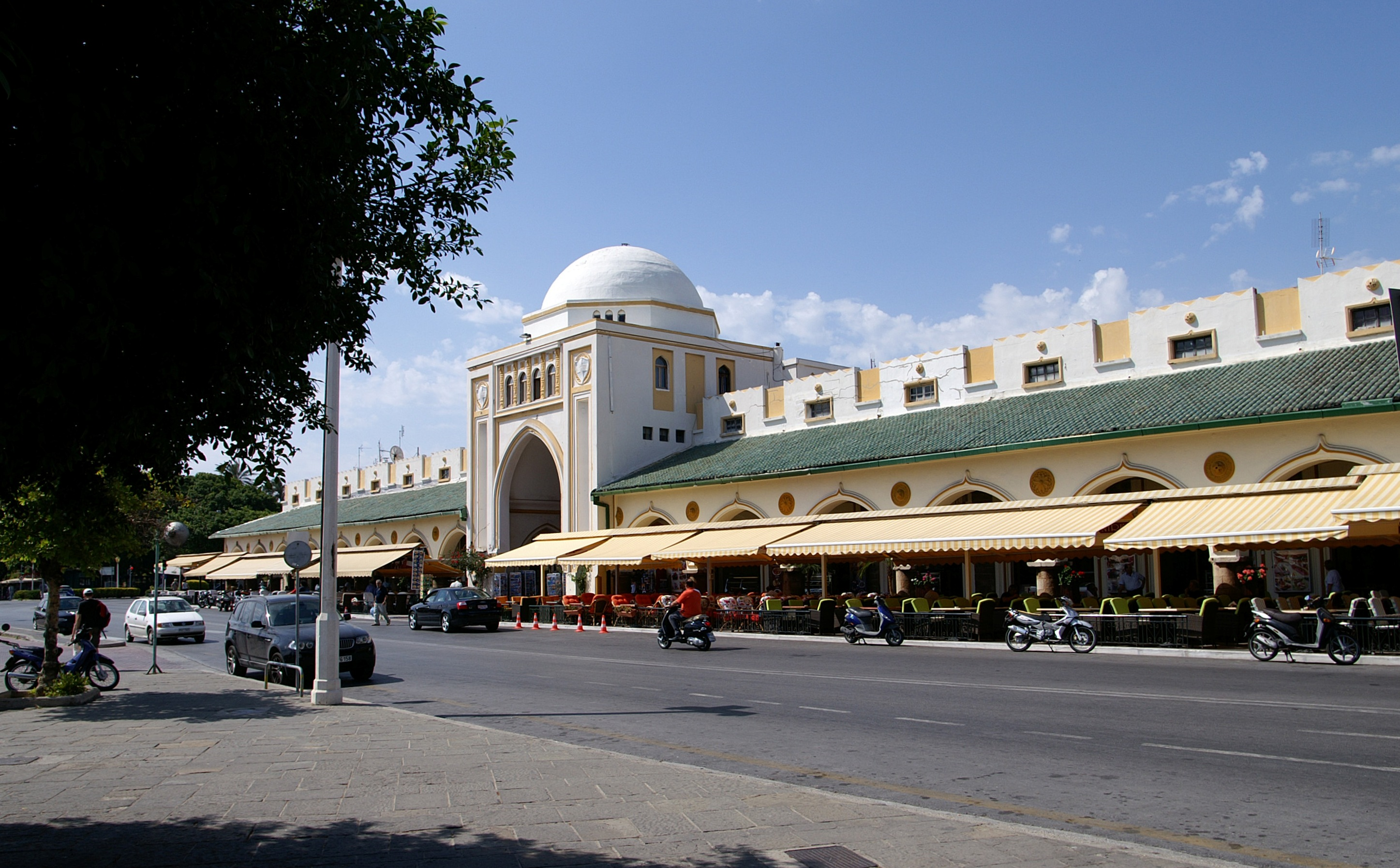 Das Hafenmarktgebäude Blick vom Mandraki-Hafen in Rhodos Stadt.Rodi Mercato - 1925 Architect Florestano Di Fausto